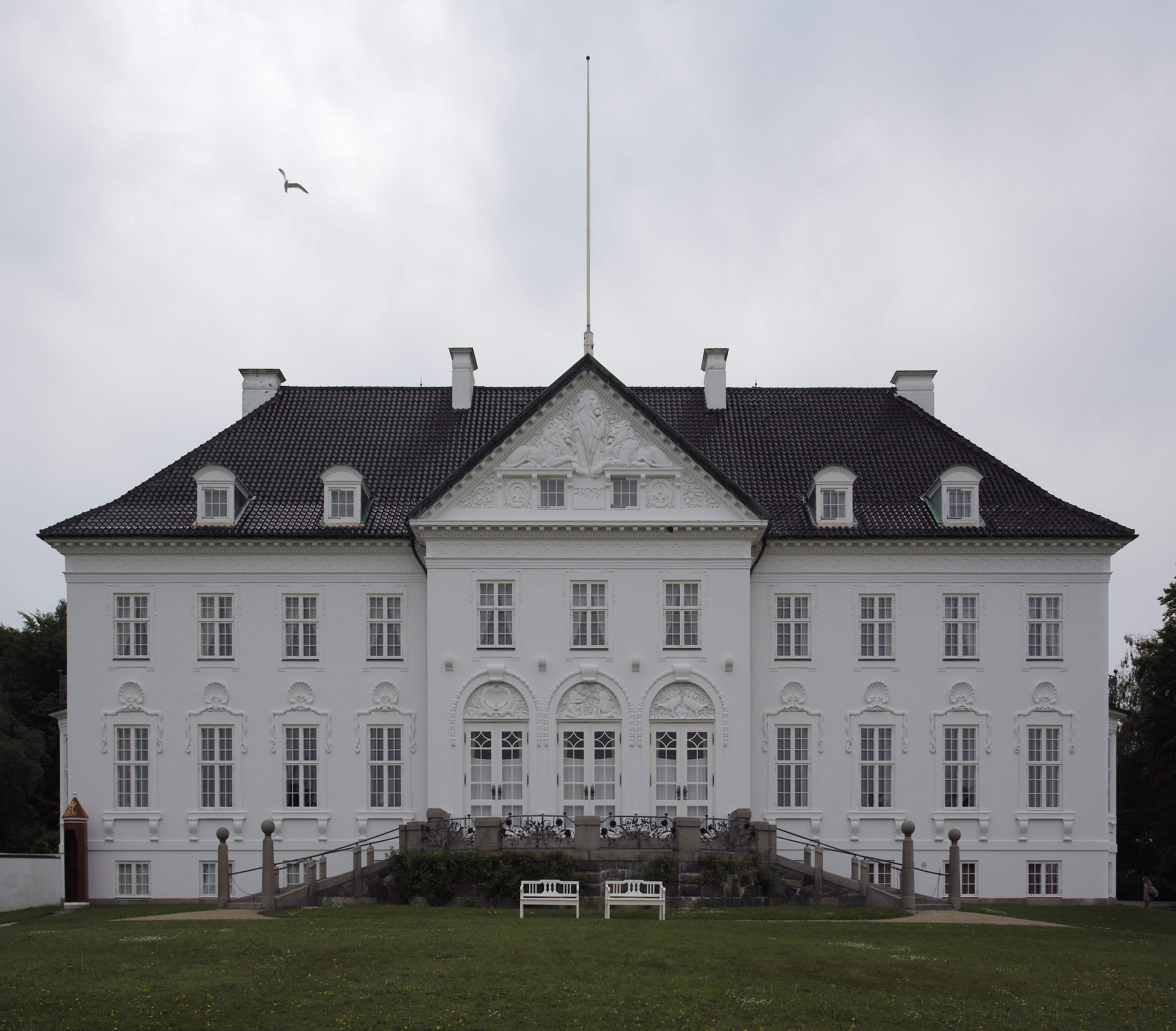 Marselisborg Slot